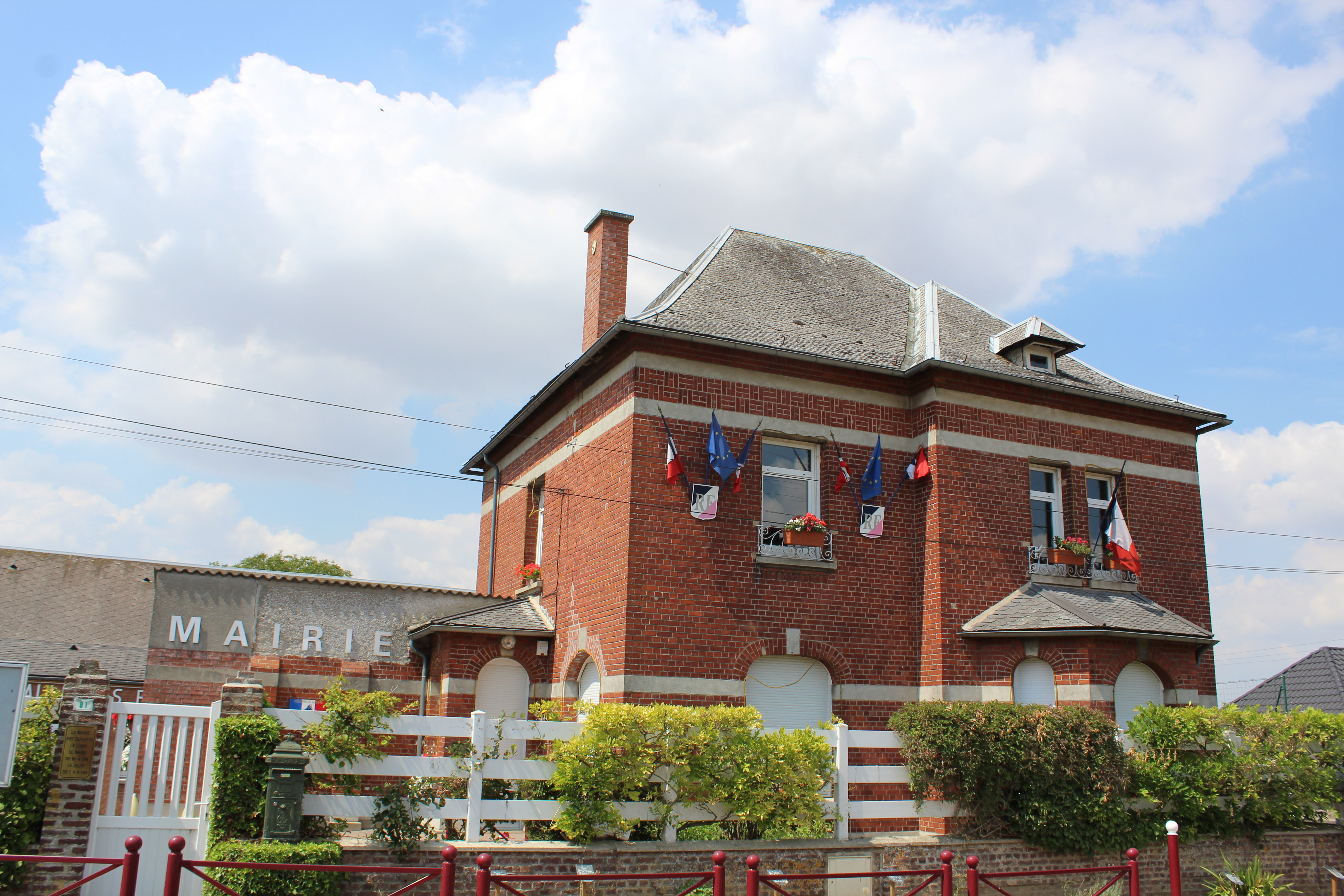 La mairie